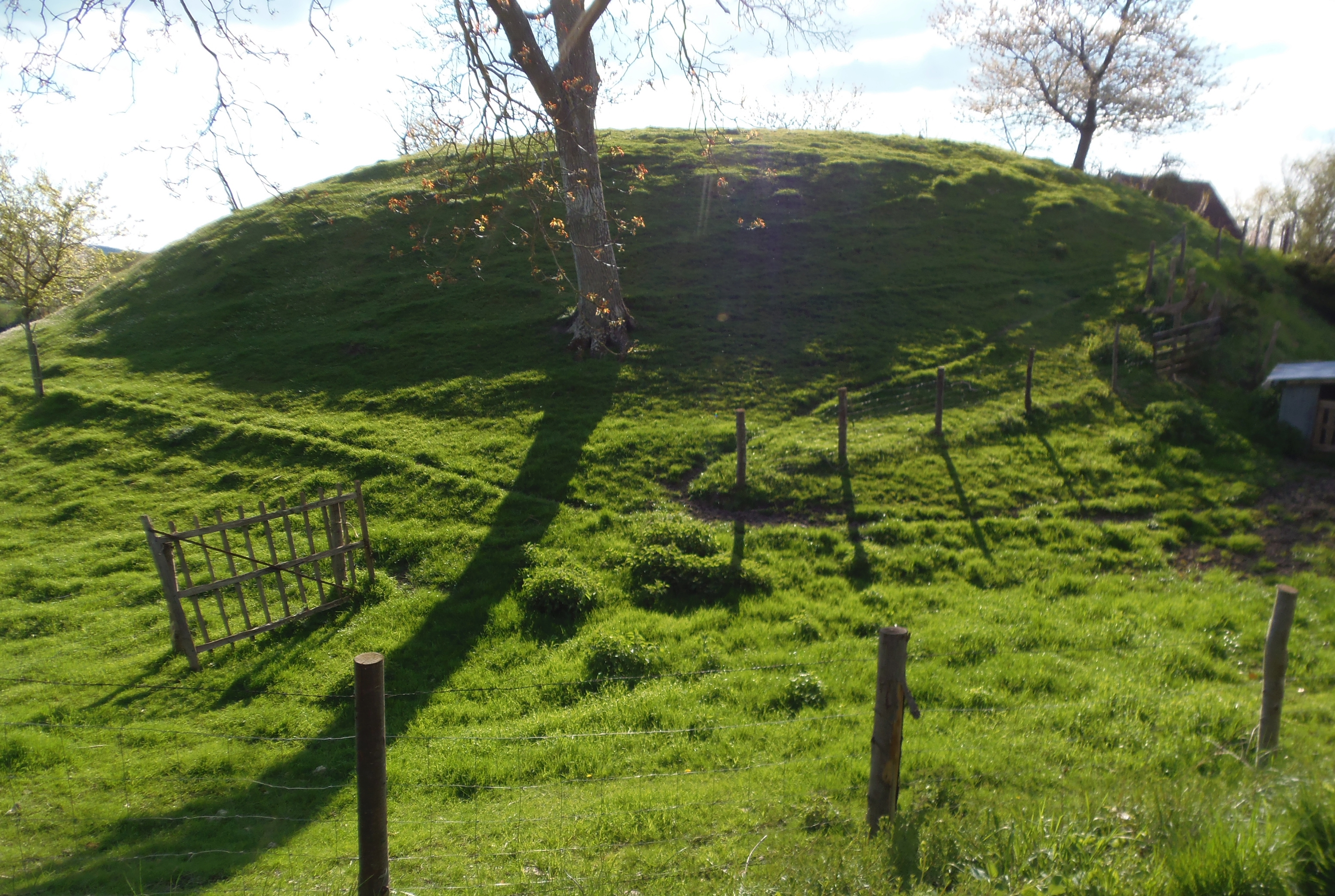 Condé-sur-Huisne (Normandie, France). Motte castrale du Ribray.